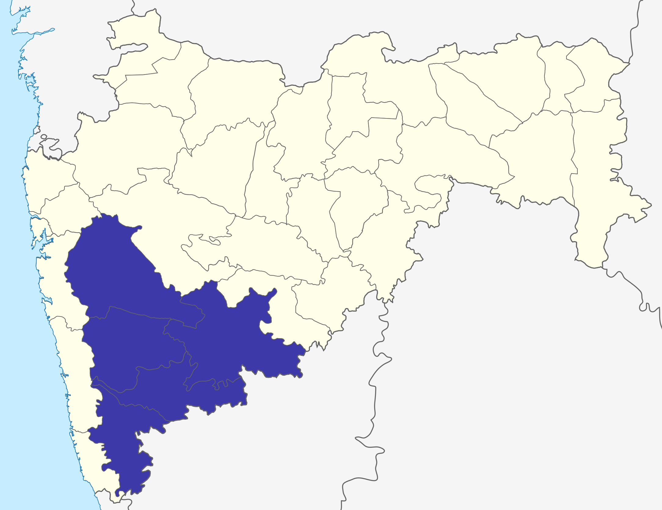 Pune division in Maharashtra, India